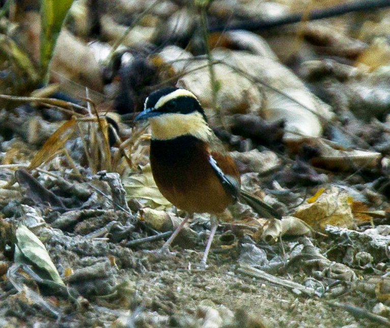 Elegant crescent-chest (Melanopareia elegans) - South Ecuador_S4E9216